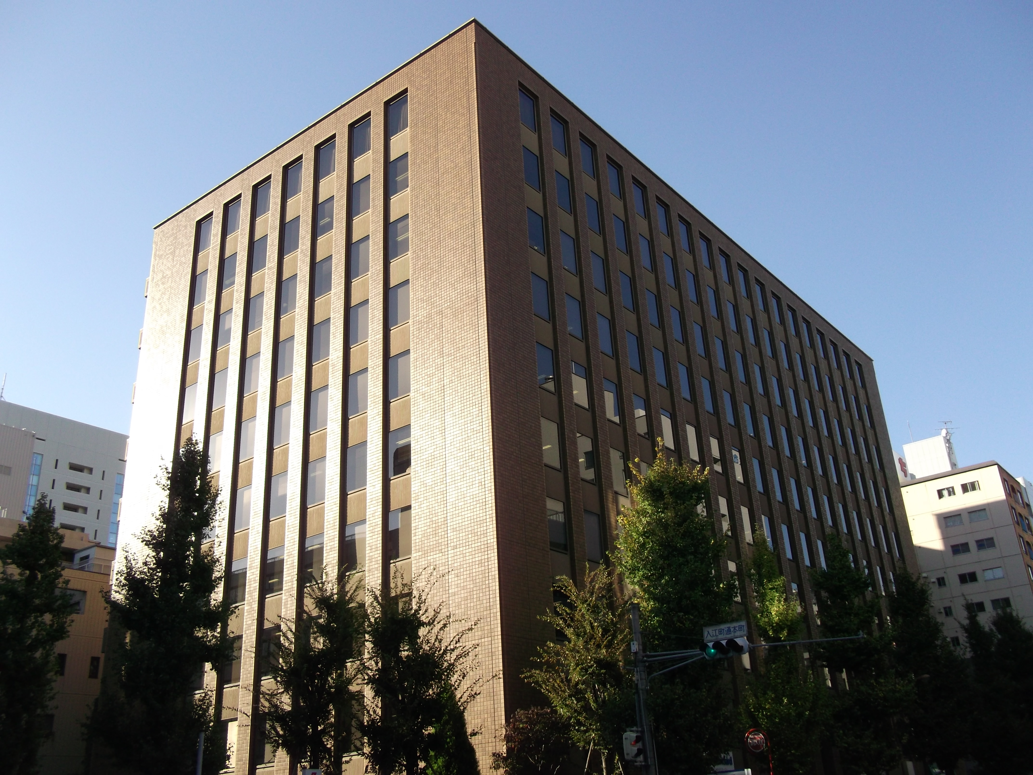 名古屋市中区栄の岡谷鋼機本社を南東側から撮影